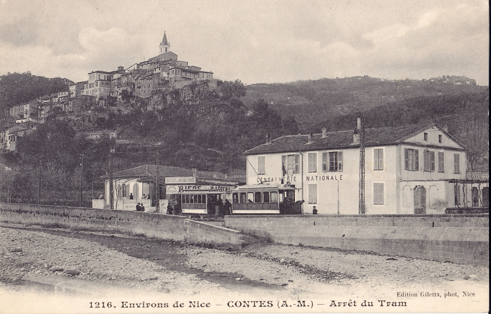 Carte postale ancienne éditée par Giletta à Nice, collection Environs de Nice, n° : CONTES - Arrêt du Tram